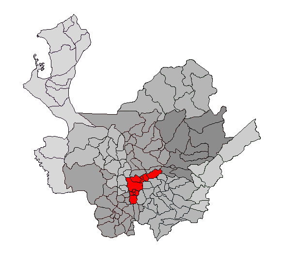 Ubicación de la región del Valle de Aburrá en el departamento de Antioquia